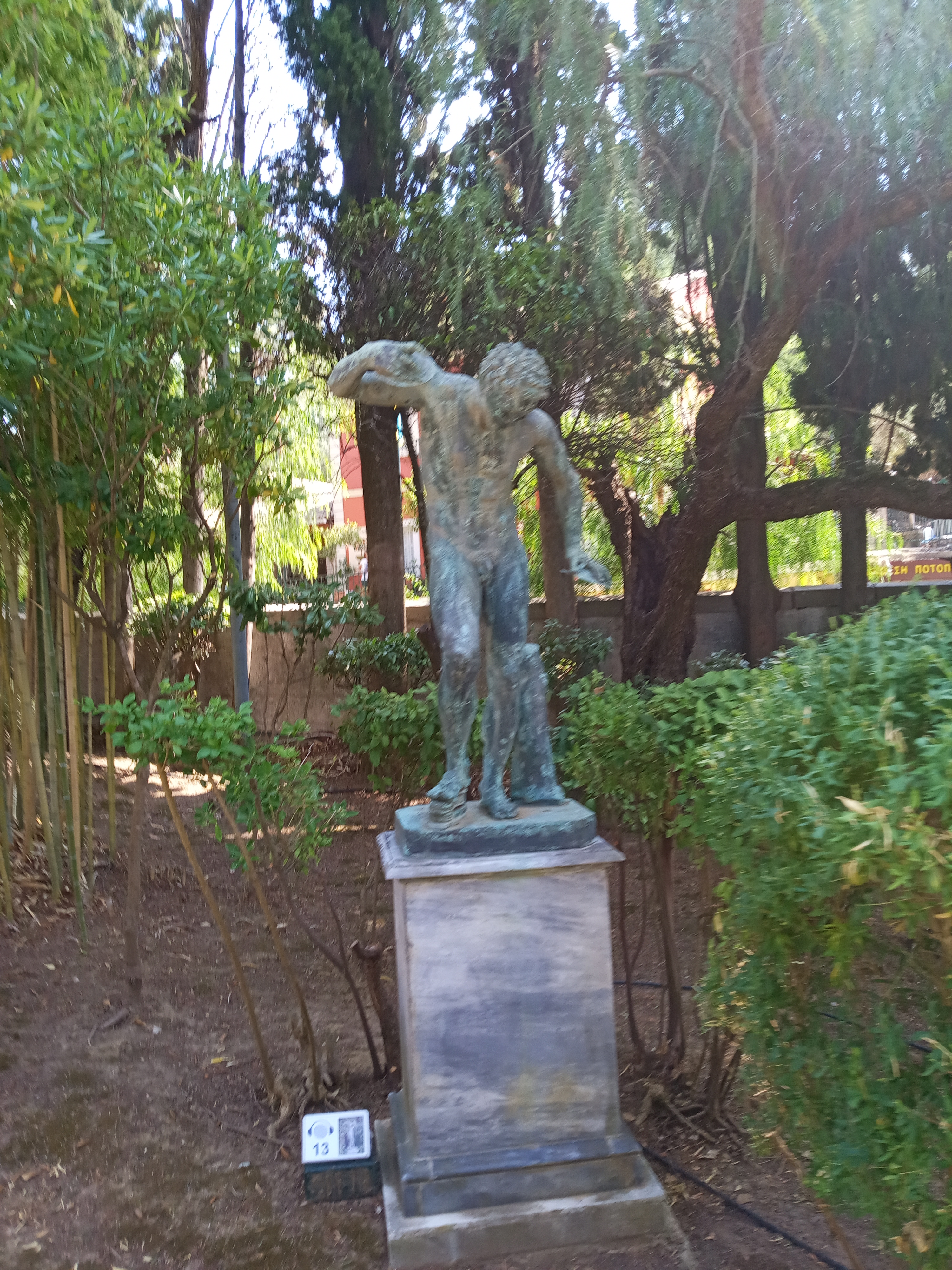 фото палацу Ахілліон